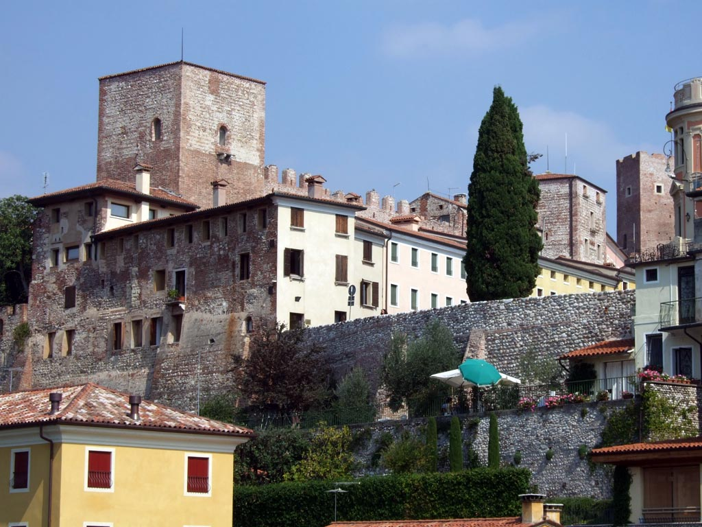 Bassano del Grappa, Castello Superiore (Upper Castle)